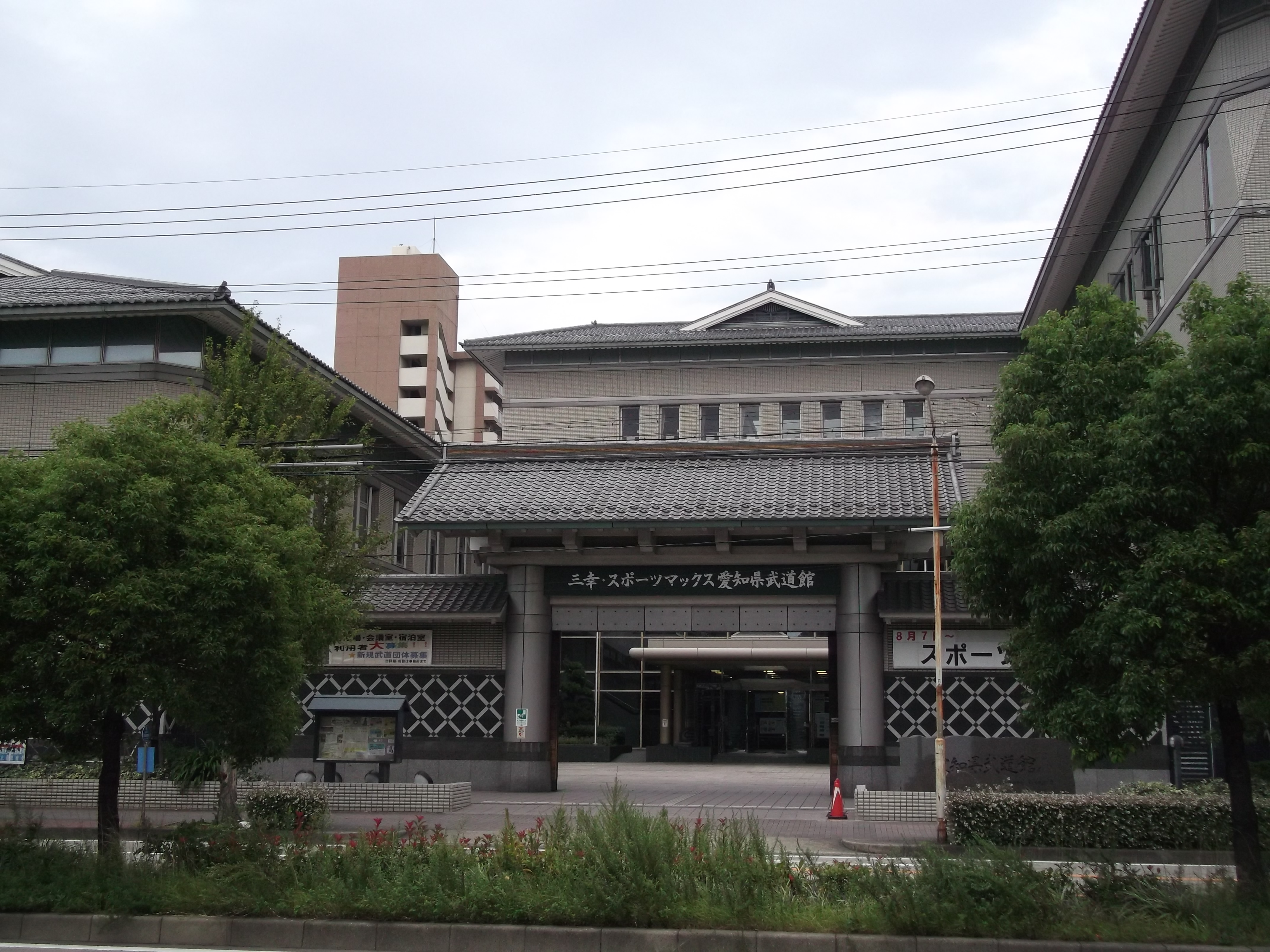 名古屋市港区丸池町の愛知県武道館を西側公道より撮影